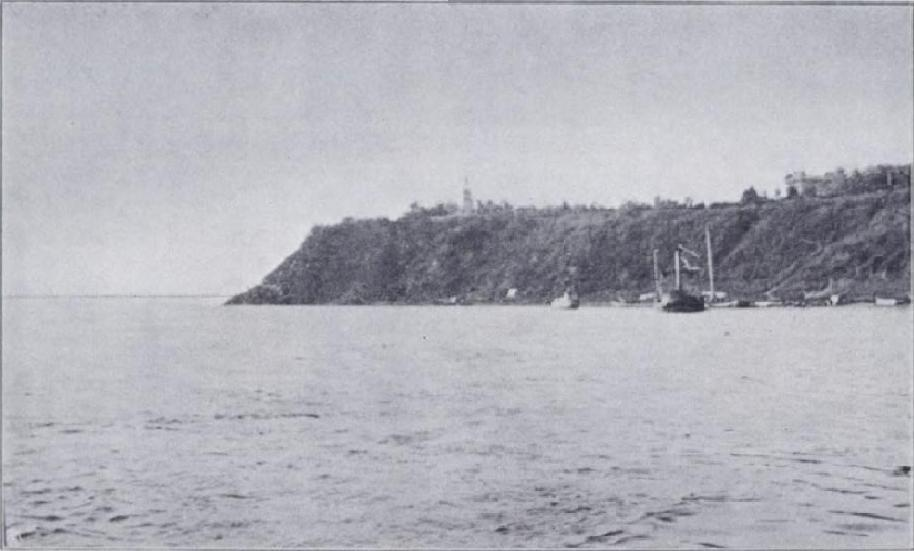 Вид на Хабаровку. 1900-е годы.